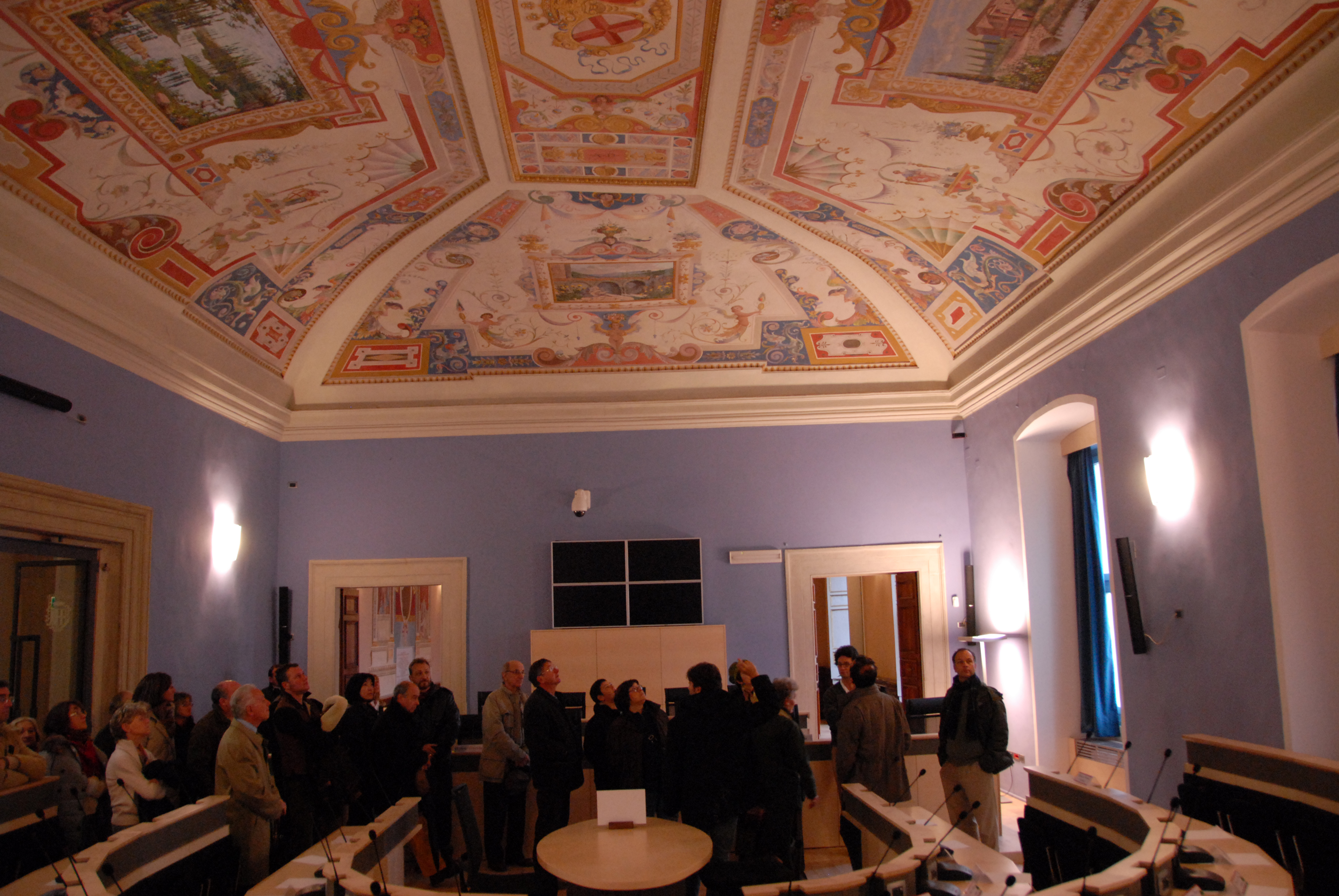 Attuale sala del Consiglio, già sede della pinacoteca